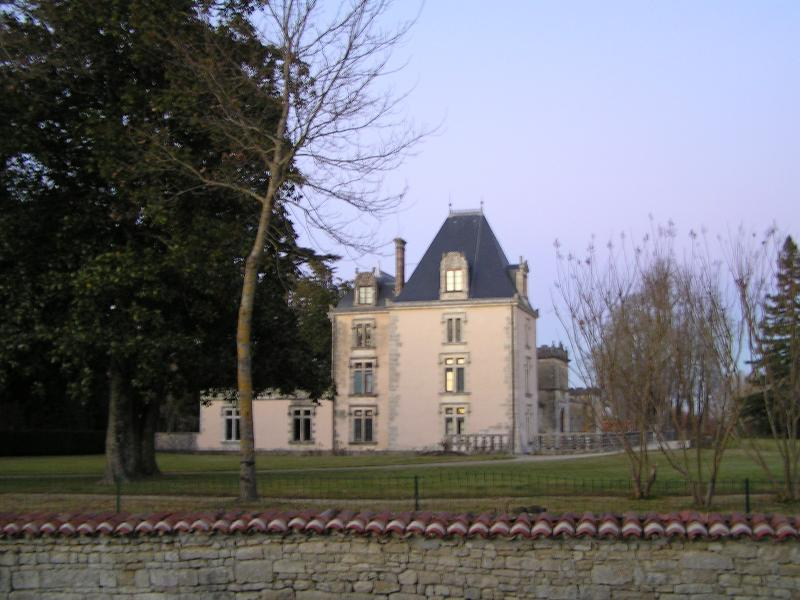 château d'Authon. Charente-maritime (17), Poitou-Charentes, France, Europe.